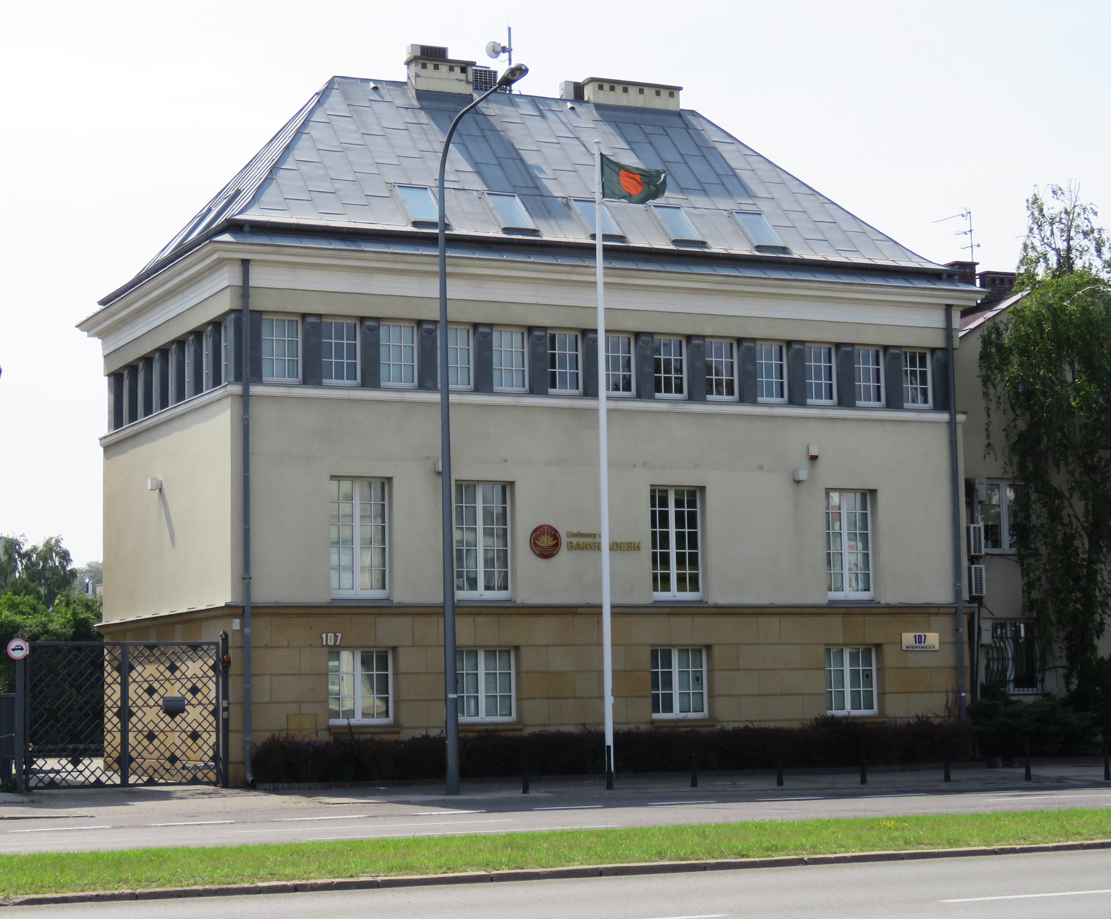 Ambasada Bangladeszu w Polsce